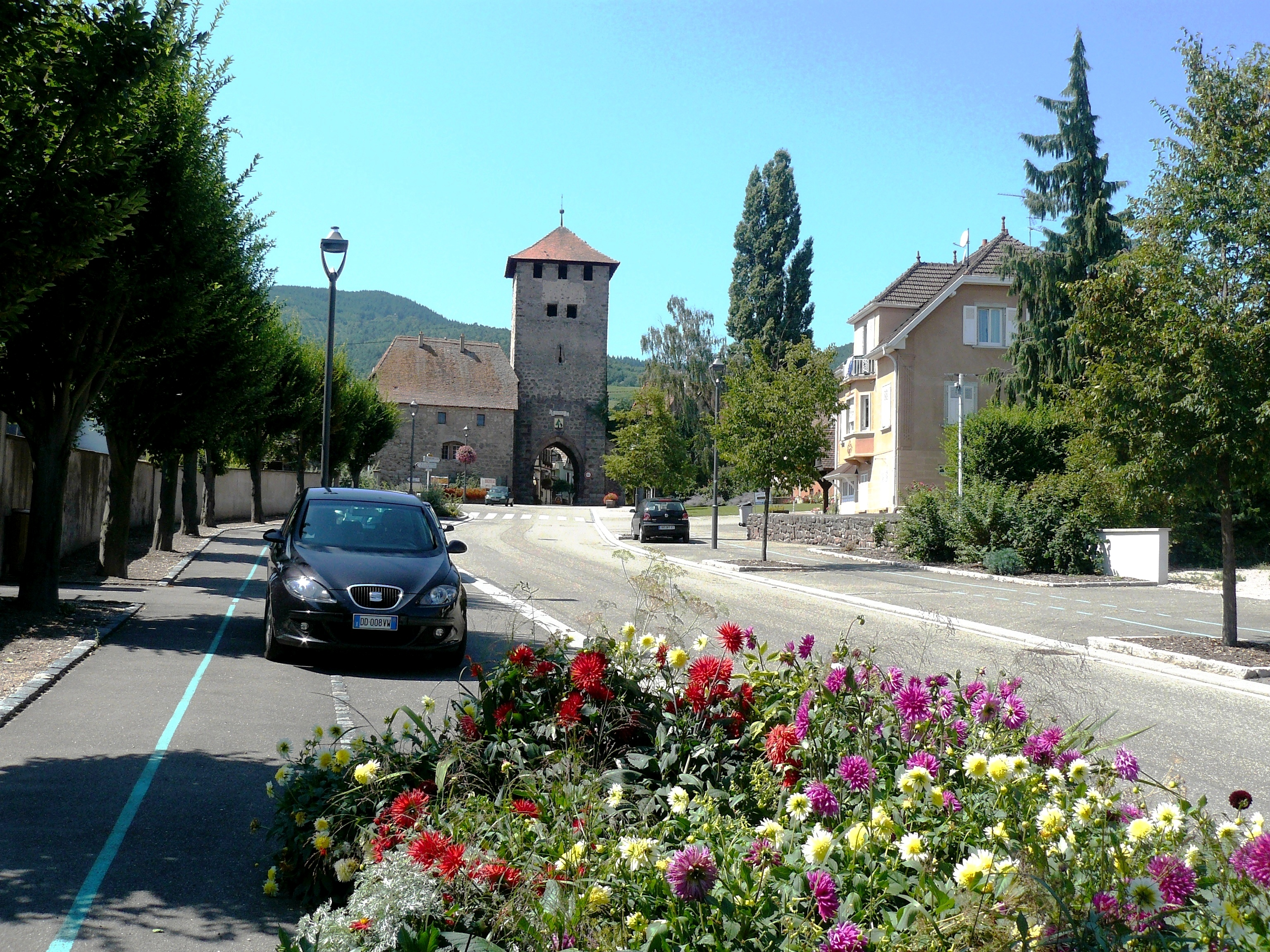 Tour-porte de Blienschwiller